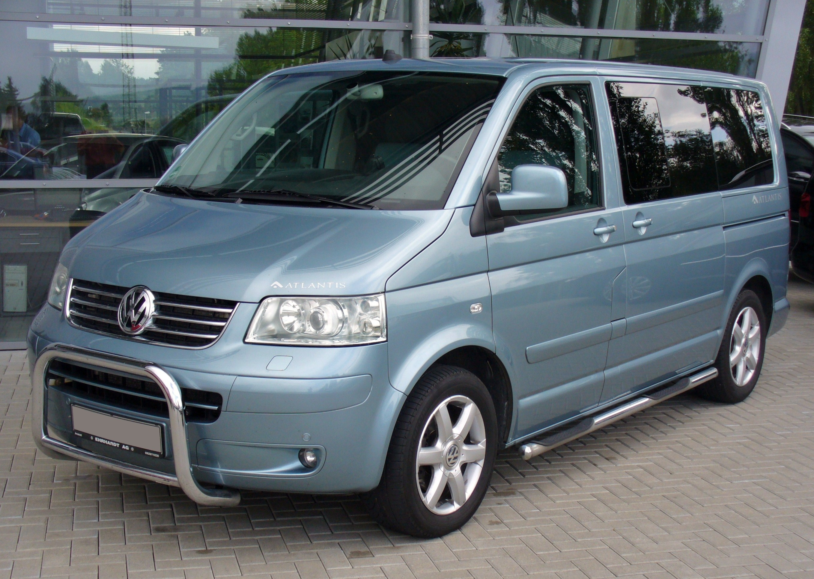 VW T5 Multivan Atlantis